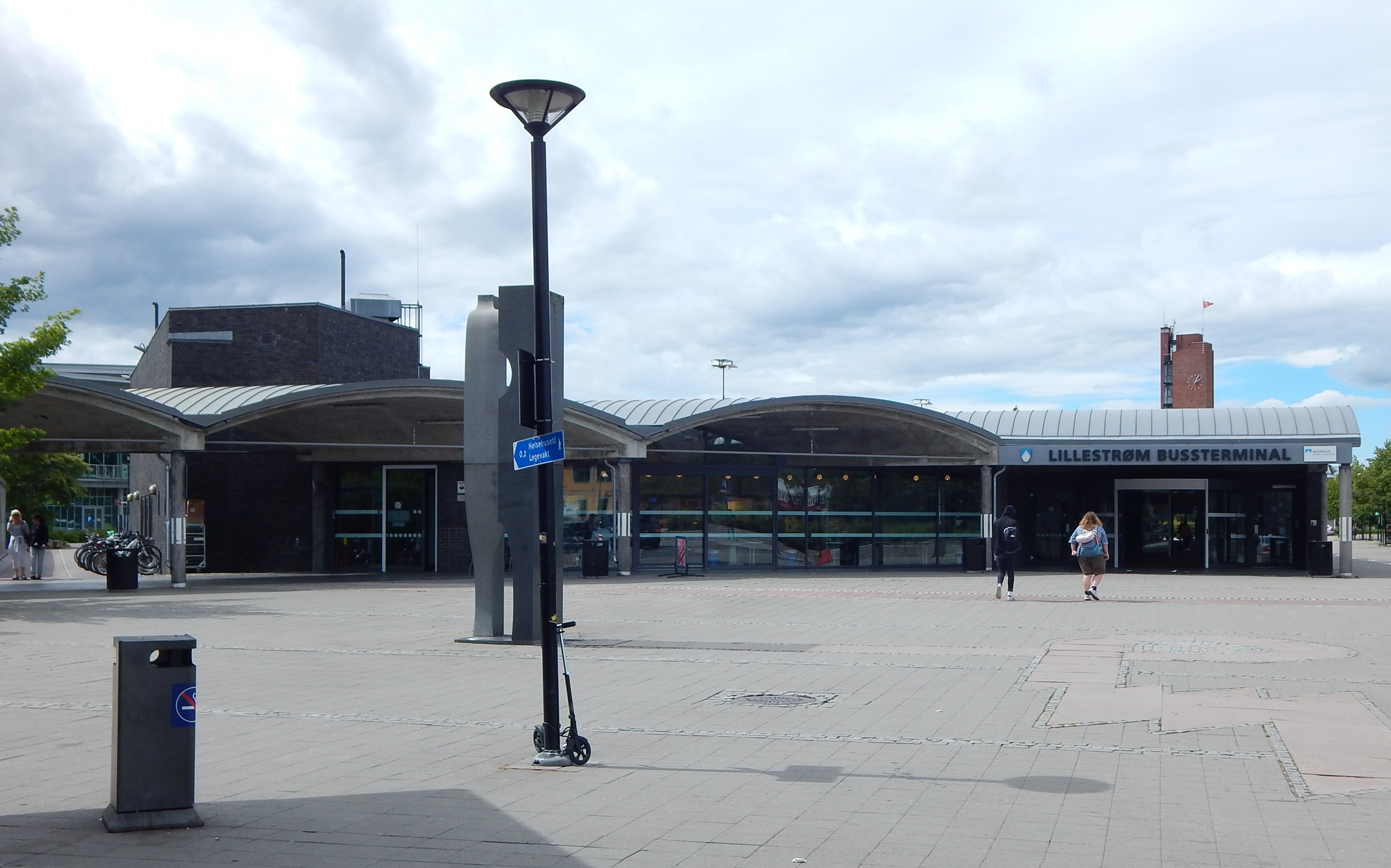 Lillestrøm bussterminal, like ved siden av Lillestrøm stasjon